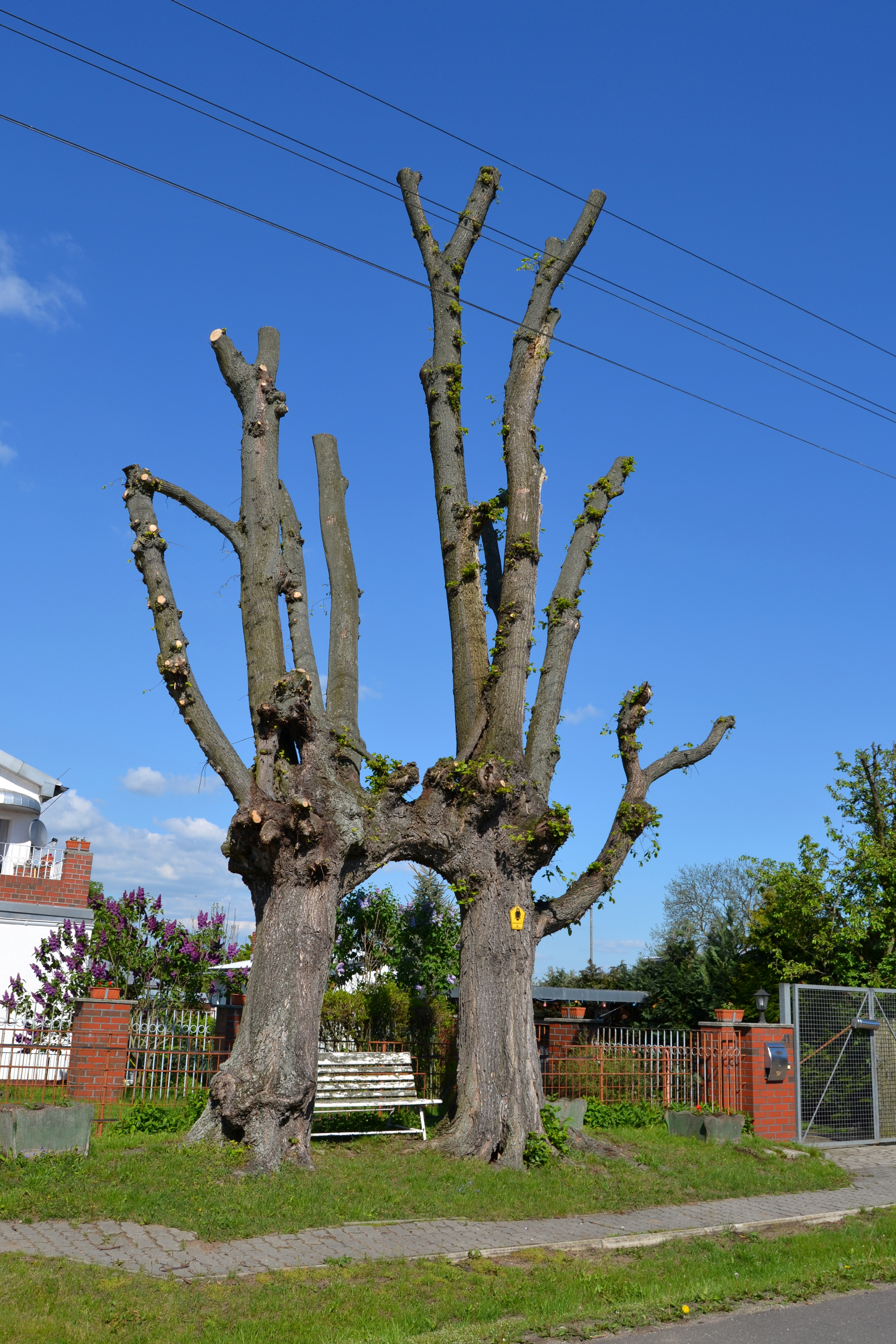 Torulmen in Buschdorf; um 1900 von Wilhelm Tornow gepflanzt; Naturdenkmal